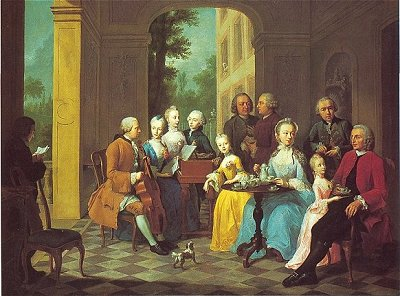 Johann Heinrich Tischbein der Ältere: Familienporträt der Familie des Hamburger Weinhändlers Timmermann (1758). In der Mitte im gelben Kleid seine spätere Schülerin, die Malerin Maria Elisabeth Vogel geb. Timmermann im gelben Kleid. Der Maler Tischbein selbst steht am rechten Bildrand hinter dem rot gekleideten, im Lehnstuhl sitzenden Hausherrn Timmermann.